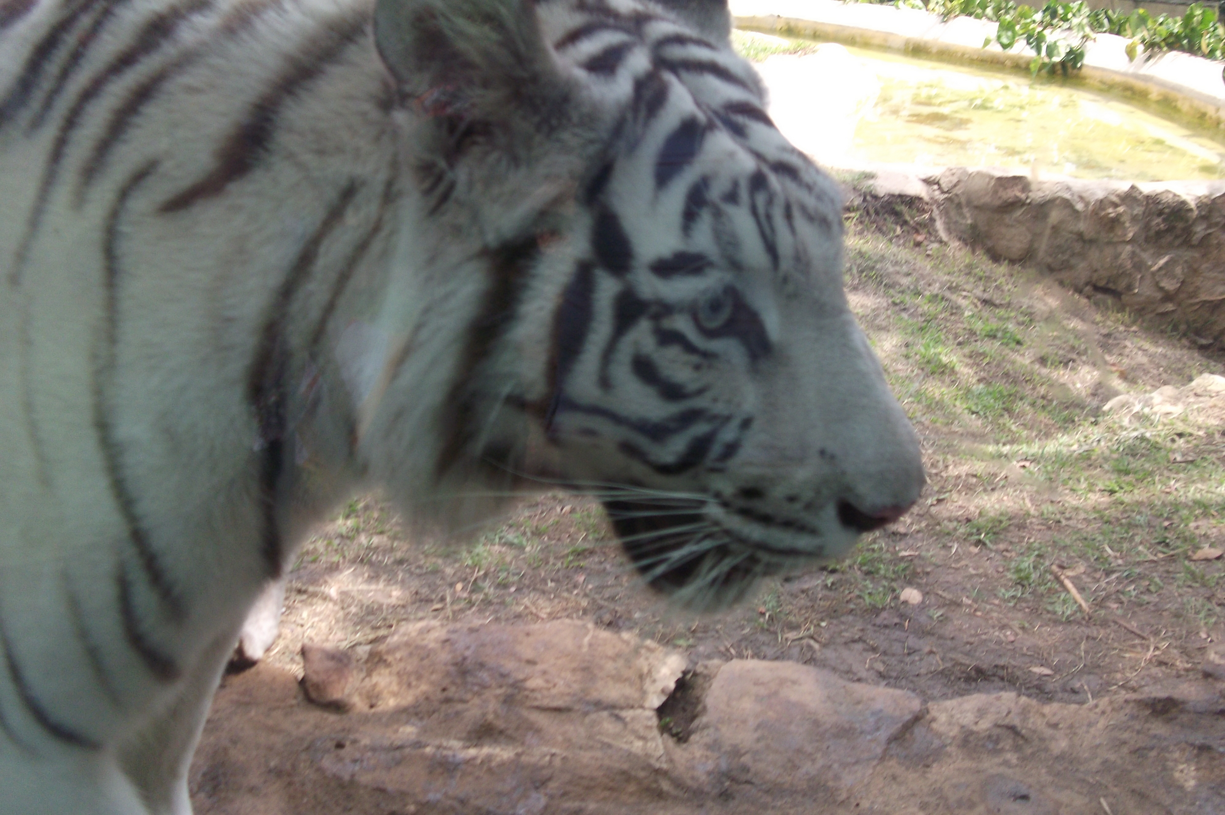 Tigre de Bengla en el Zoologico de Cali.